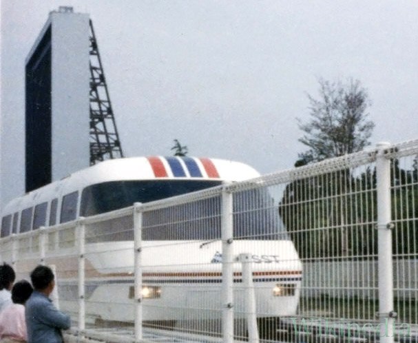 1985年の国際科学技術博覧会で、AブロックにあったHSSTをDブロック方面に向かって撮影。